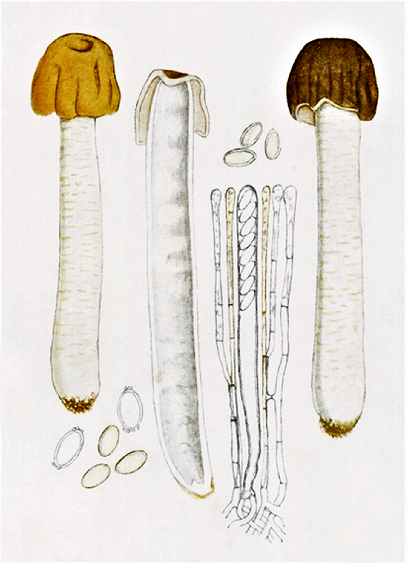 Bres.: Verpa digitaliformis Pers. (1822)